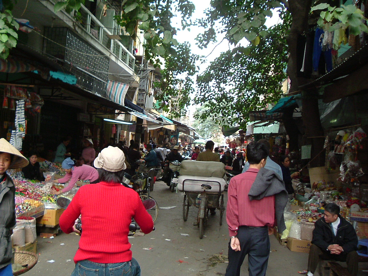 Marktstrasse in Haiphong zu Tet 2004